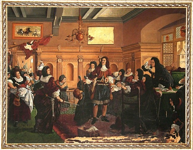 Wtargnięcie kobiet do ratusza w Lwówku Śląskim w 1631